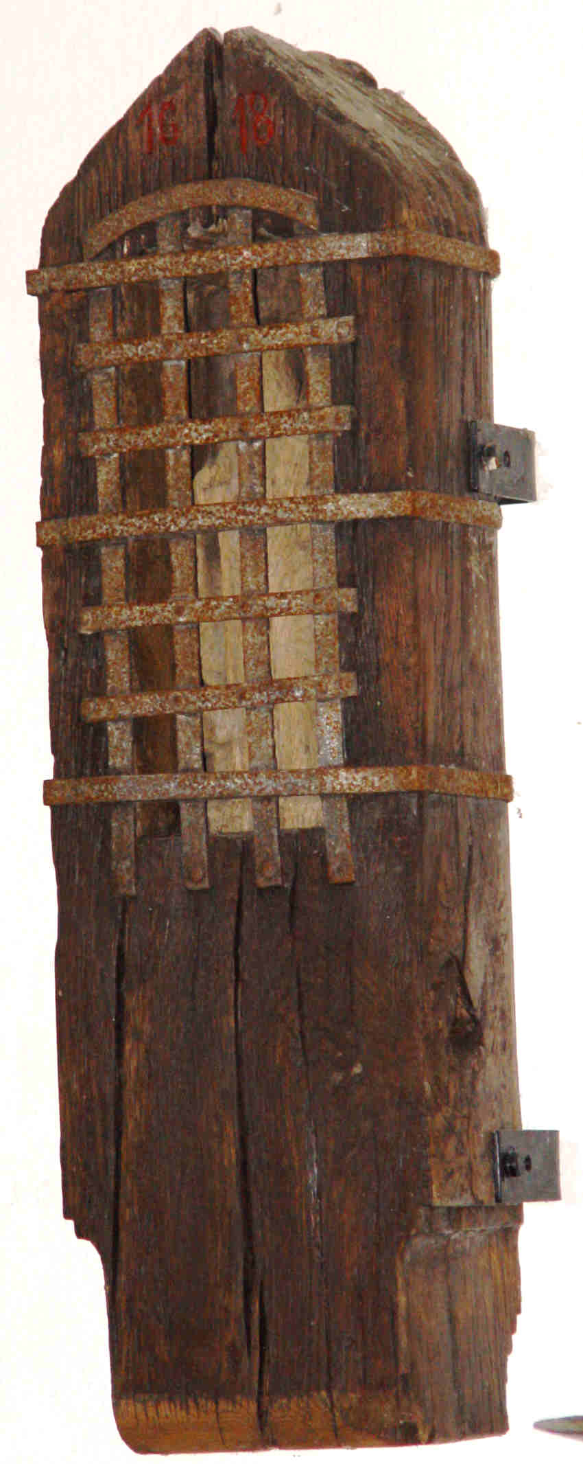 Bildstock des Hl. Antonius von Padua in der Friedeskappel, Borberg. 1618